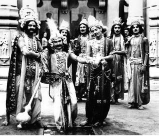 A scene from Draupadi Vastrapaharanam